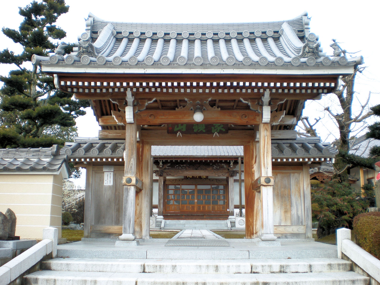 愛知県小牧市にある泉徳寺の山門